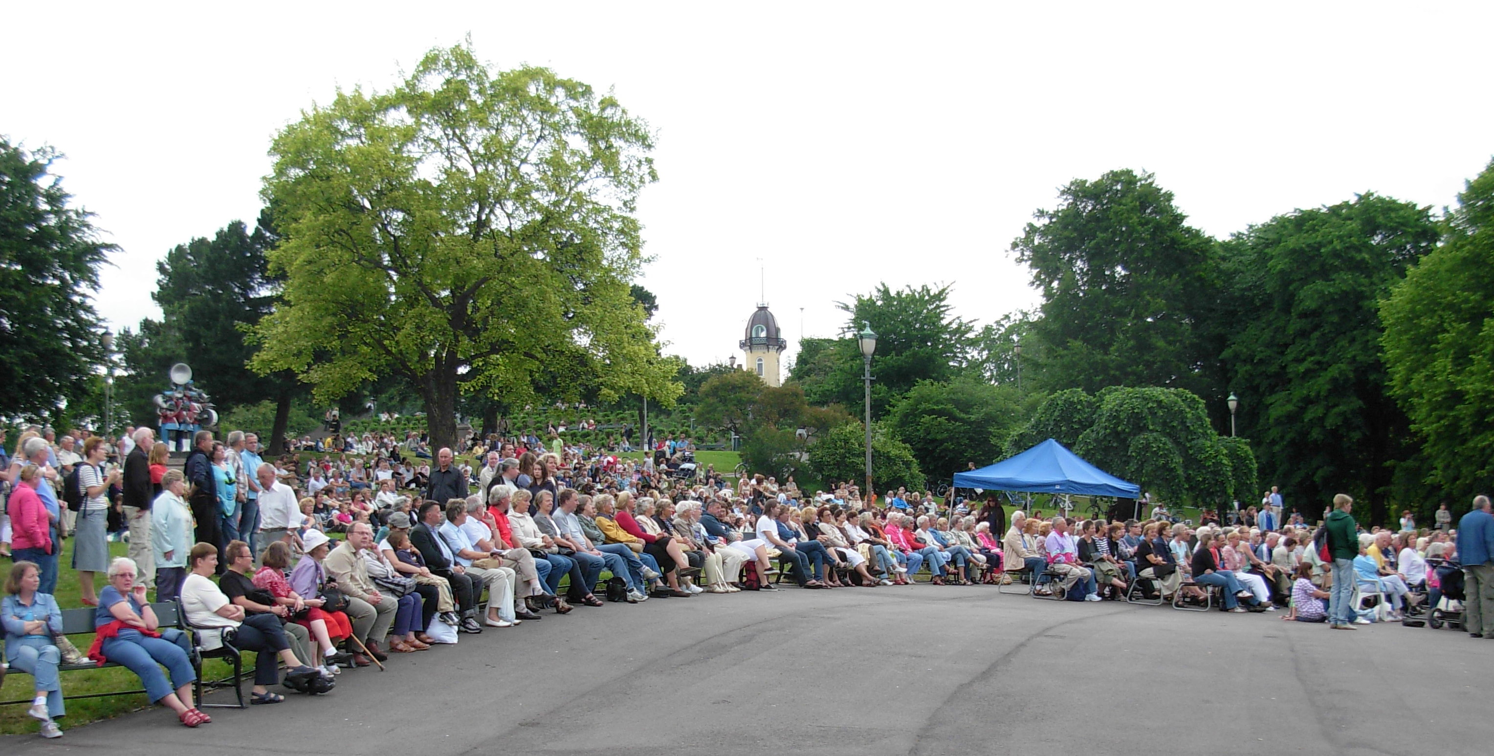 Parkkveld 21. juni 2007, St. Hanshaugen